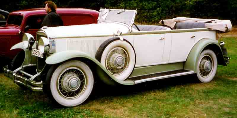 1931 Buick Series 60 Model 65 Phaeton